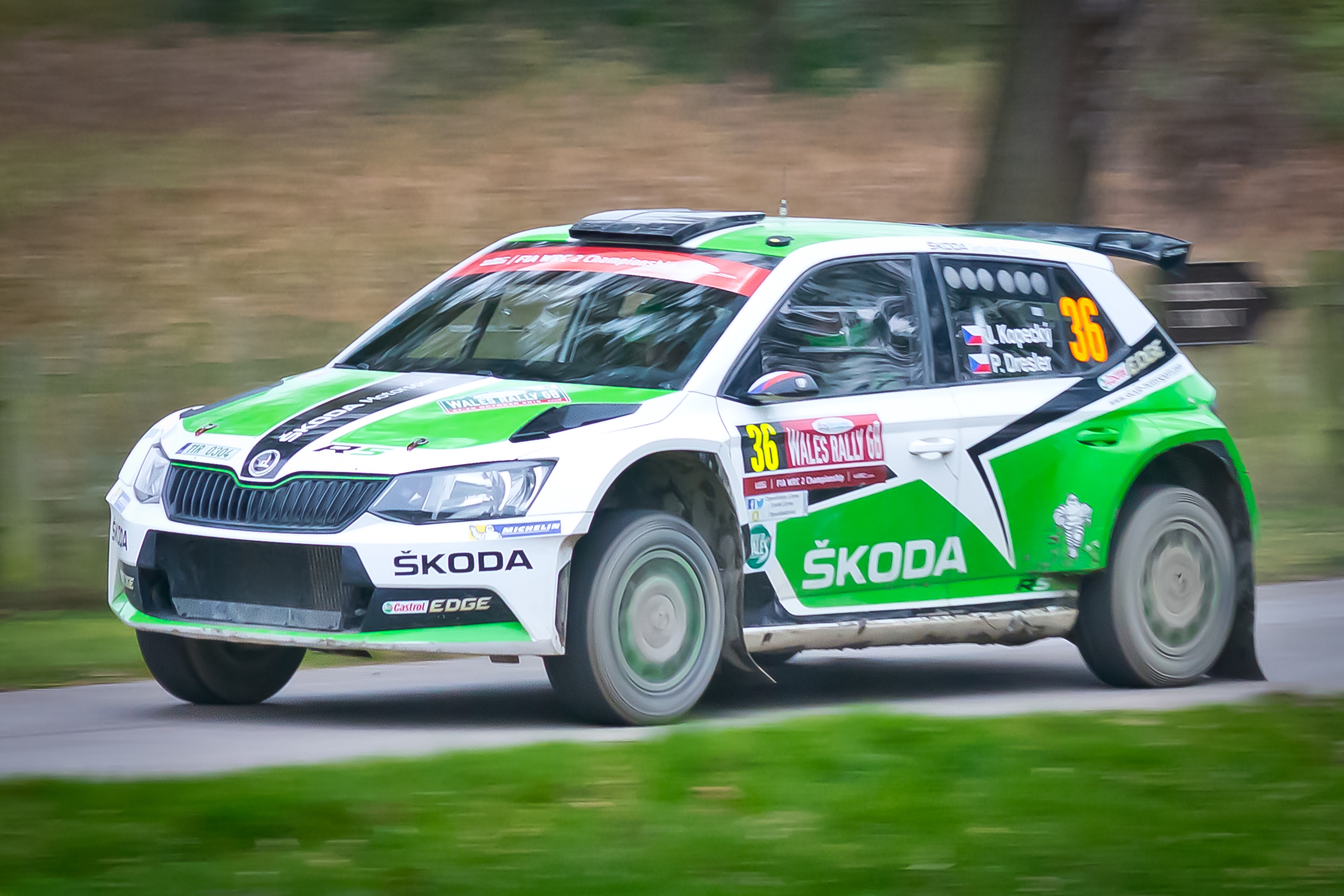 Jan Kopecký podczas Rajdu Wielkiej Brytanii 2016